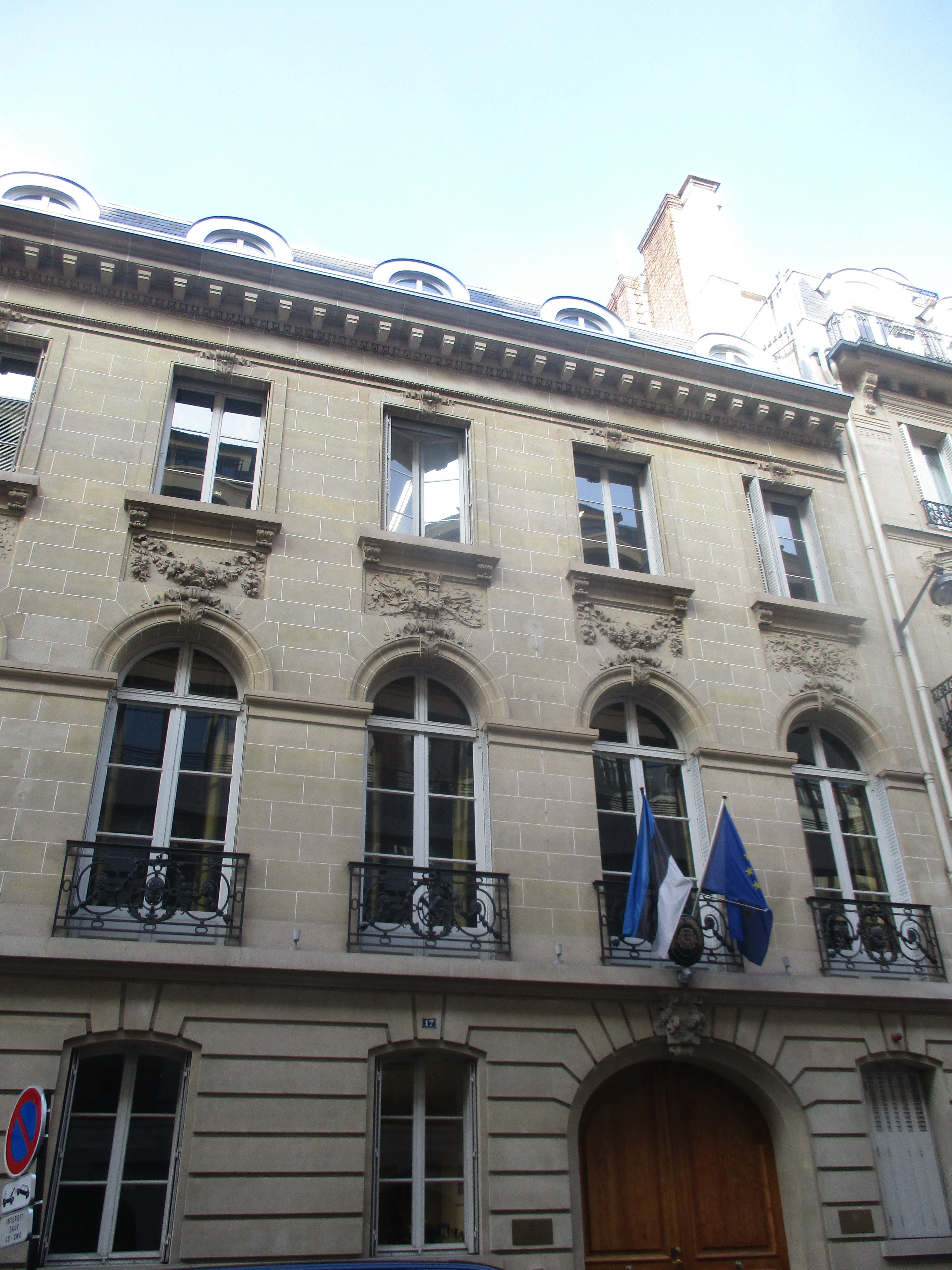 Ambassade d'Estonie à Paris, 17 rue de La Baume, Paris VIIIe.